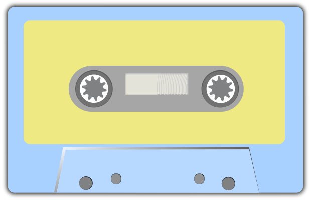 A cassete tape icon